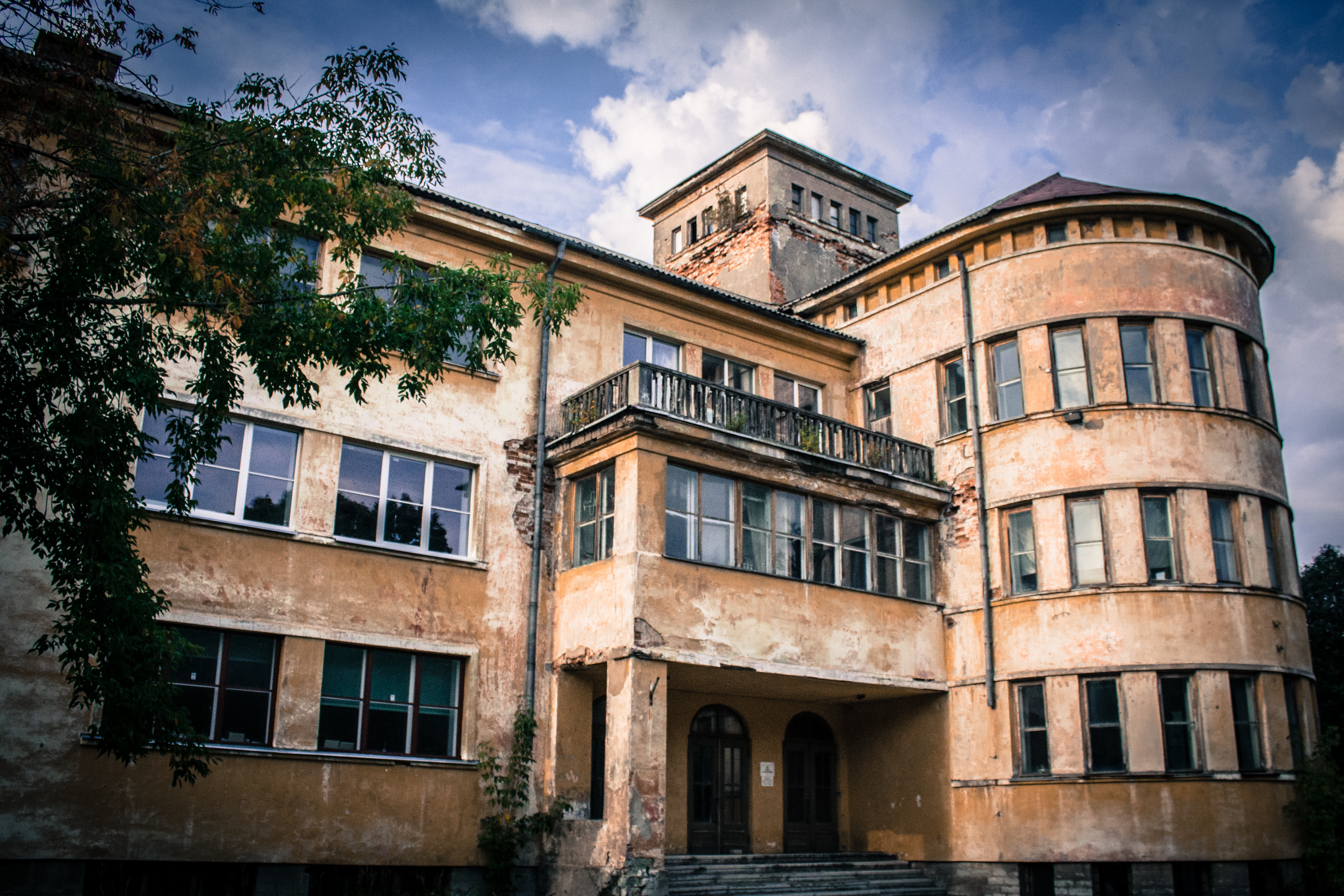 Kohtla-Järve koolihoone, 1938-1939